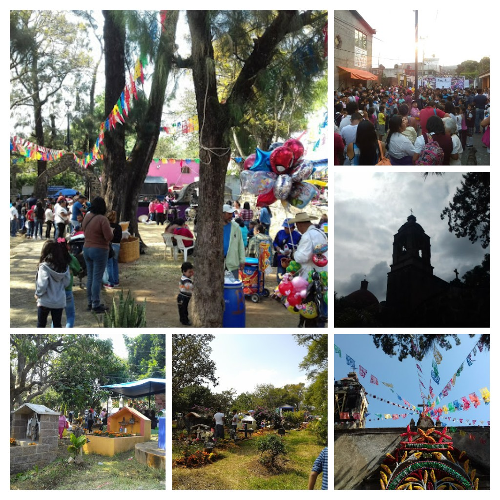 Sitios de interés